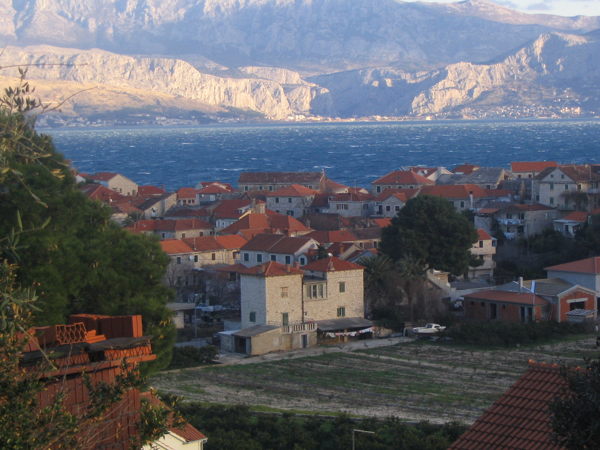 Postira, Brač, Croatia